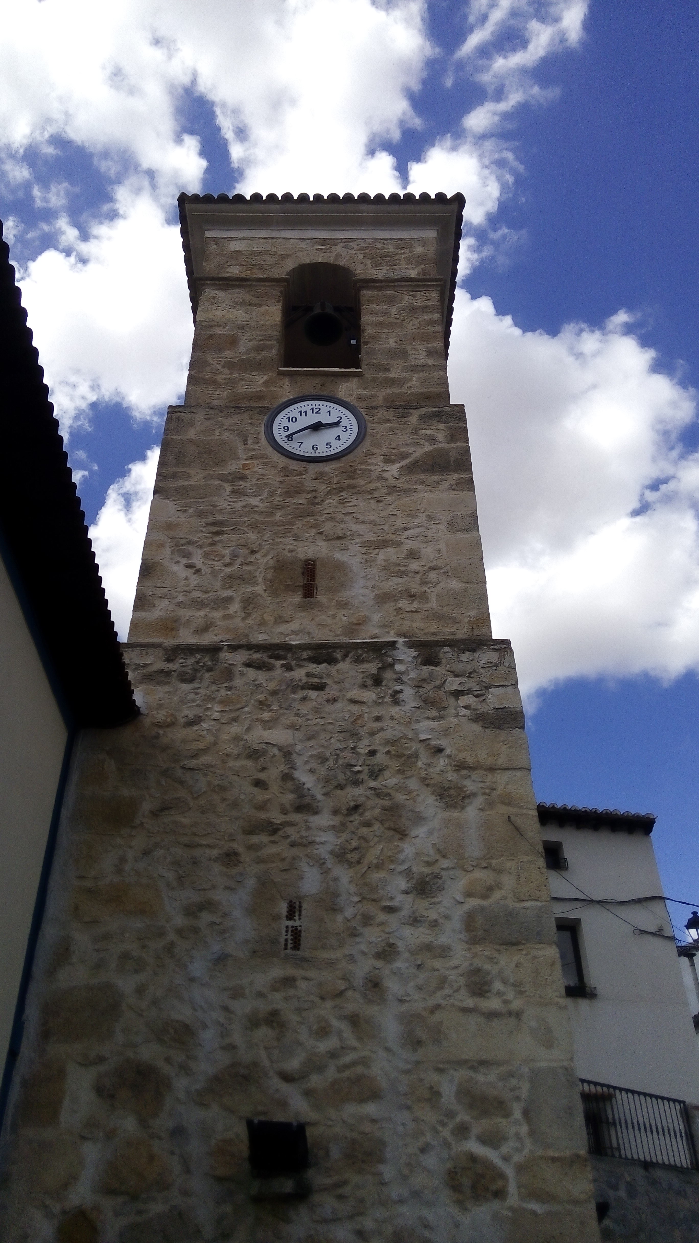 Torre del Reloj sXVII, en Loranca de Tajuña, provincia de Guadalajara, España